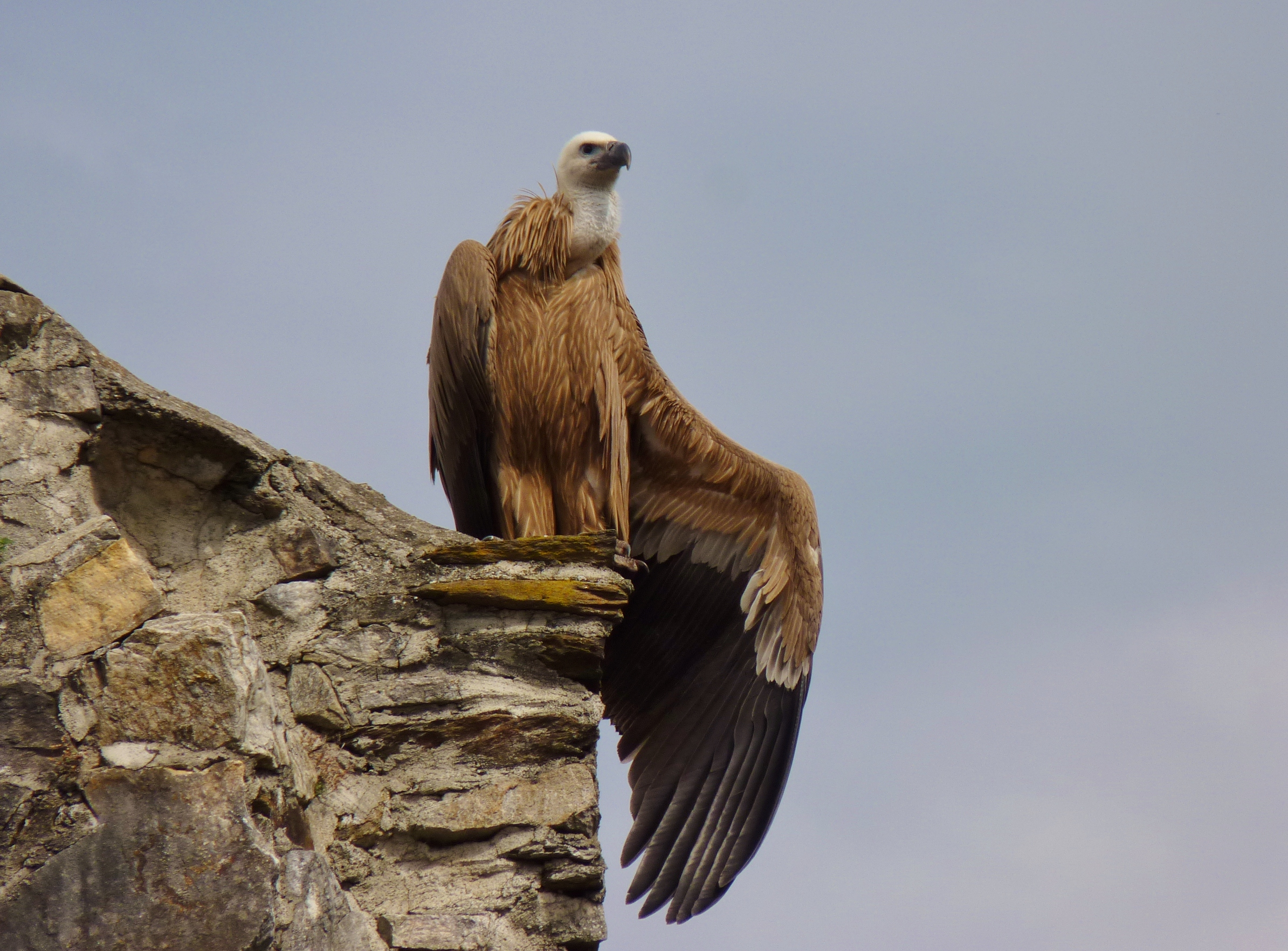 Gänsegeier (Gyps fulvus)